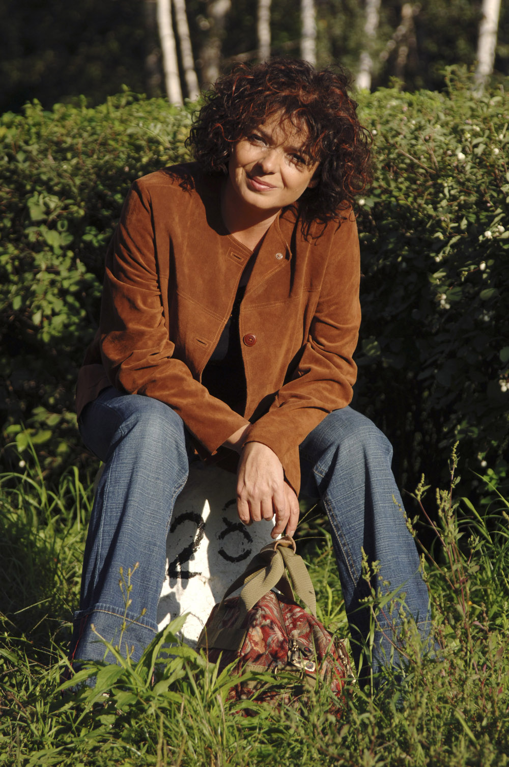 Katarzyna Grochola